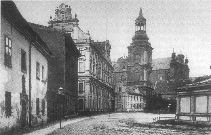 Kolegium jezuickie ok 1895 roku